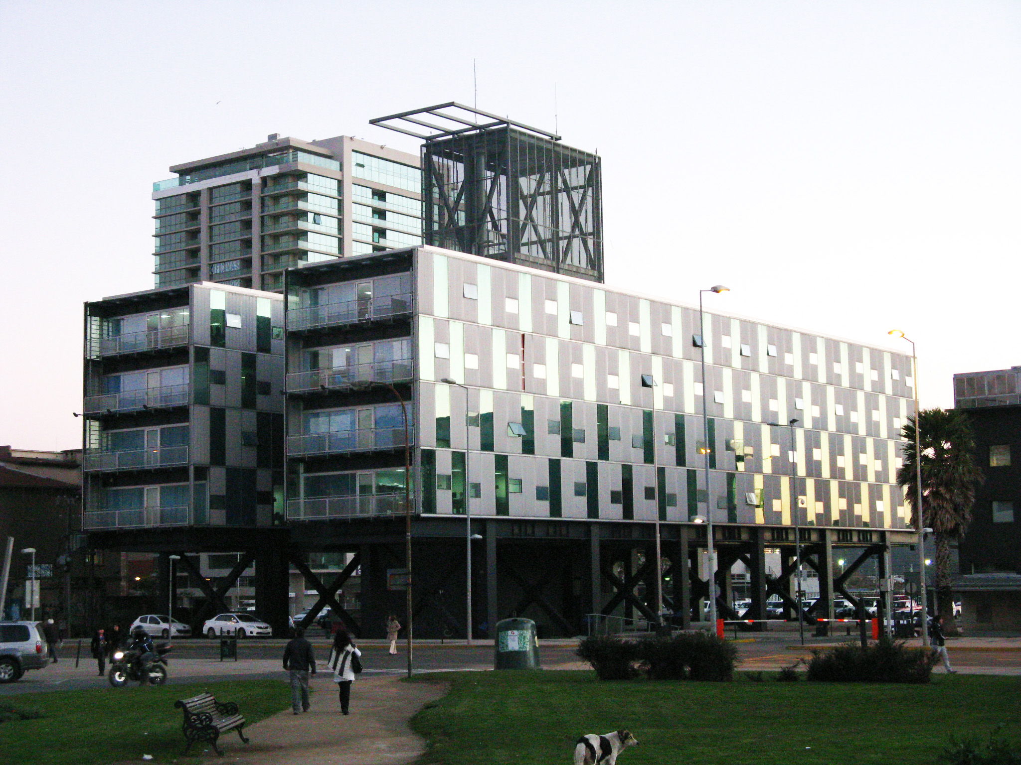 Edificio del MOP Centro Cívico de Concepción Concepción, Chile Julio de 2012